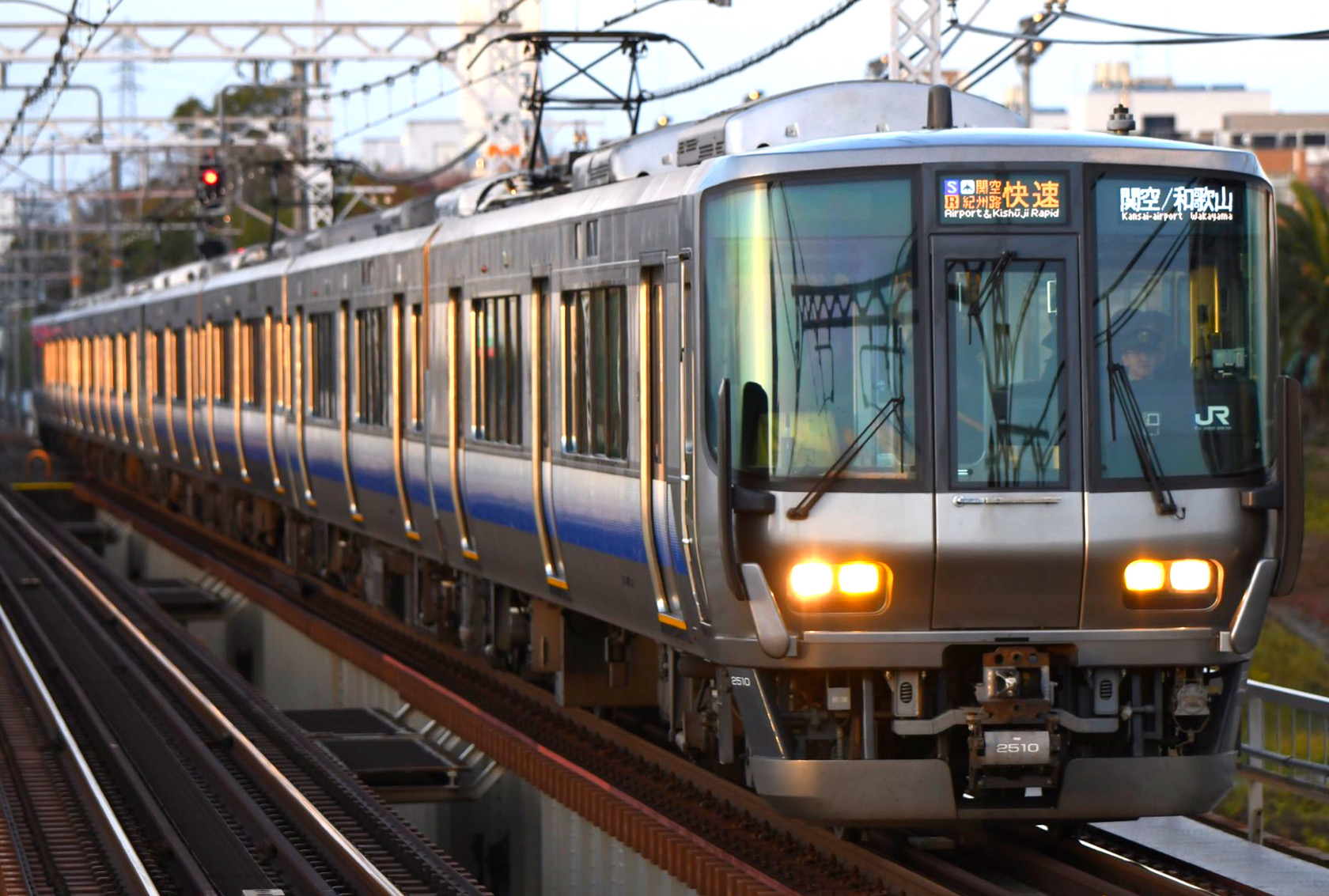 223系2500番台HE426+HE429 関空・紀州路快速 阪和線大和川橋梁にて